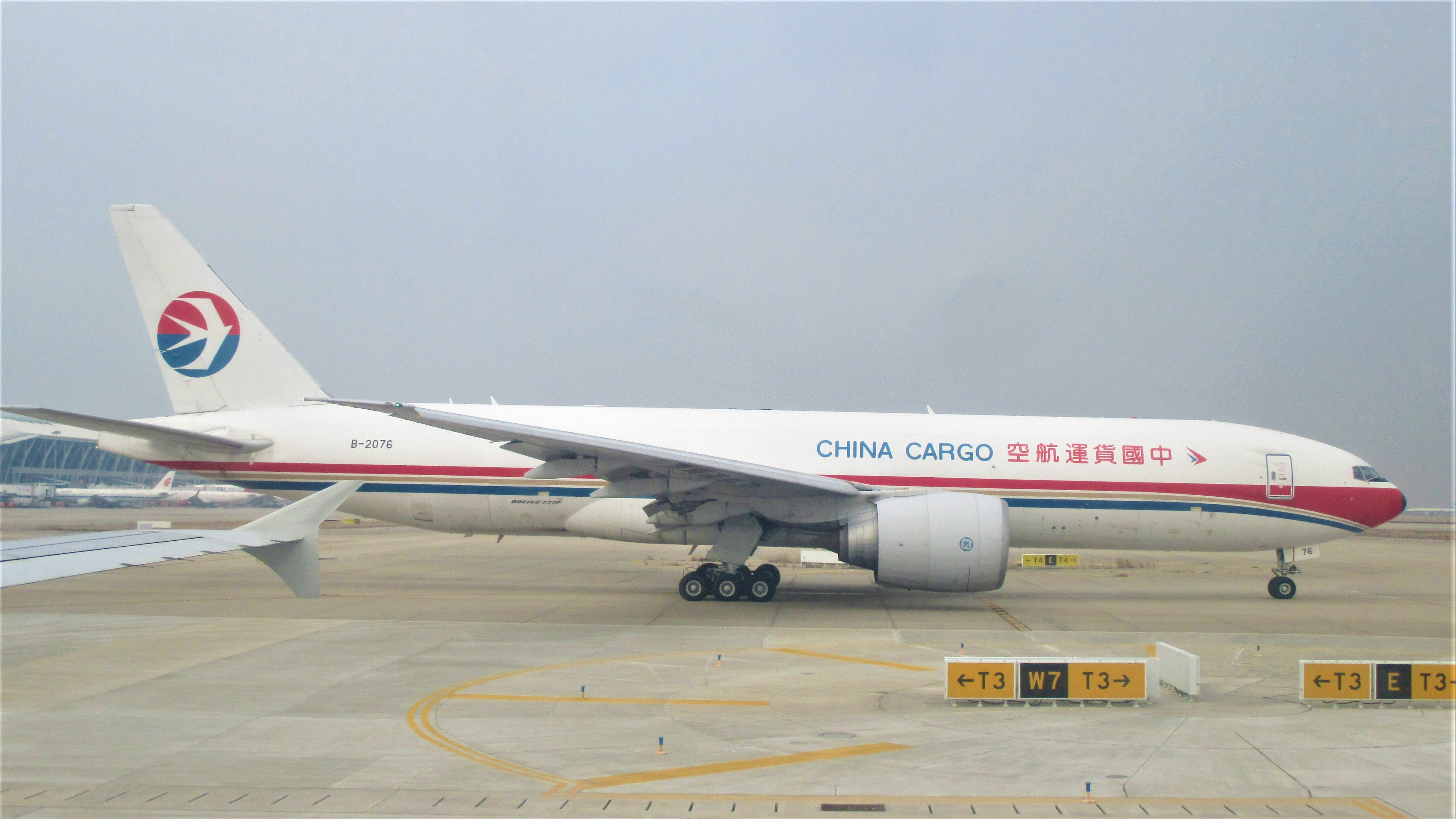 上海・浦東国際空港で別の旅客機の機内から撮影